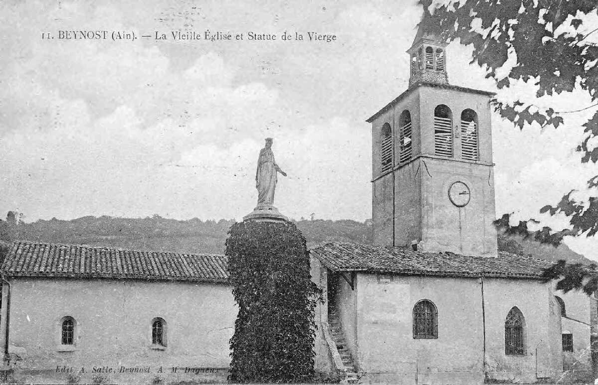 Première église Saint-Julien de Beynost, carte postale ancienne. La statue de la Vierge a été déplacée devant la seconde église.